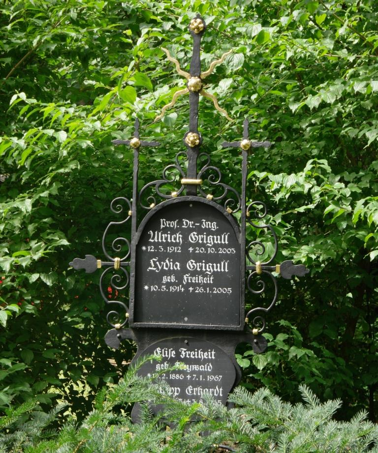 Grab des Thermodynamikers Ulrich Grigull, 1912-2003, auf dem Waldfriedhof in München-Solln